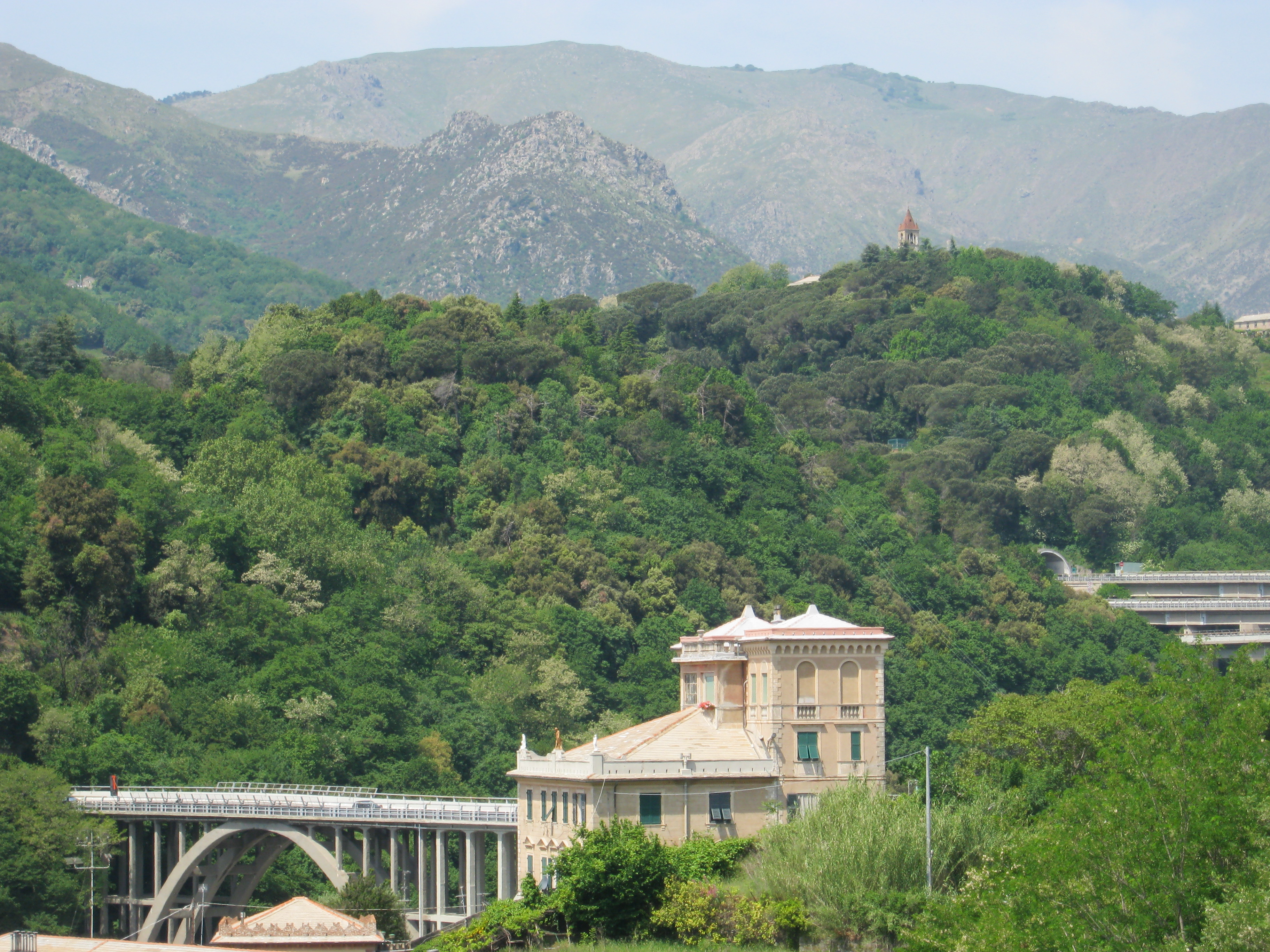 Monte Reixa, visto da Voltri. Nella foto, in alto con la vetta un po' a sinistra. Si vedono anche: la "Rocca dei Gatti", sotto il Reixa; il campanile di "san Nicolò"; viadotti della A10 e A26.